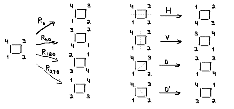 Diedriryhmän alkioiden havainnollistaminen